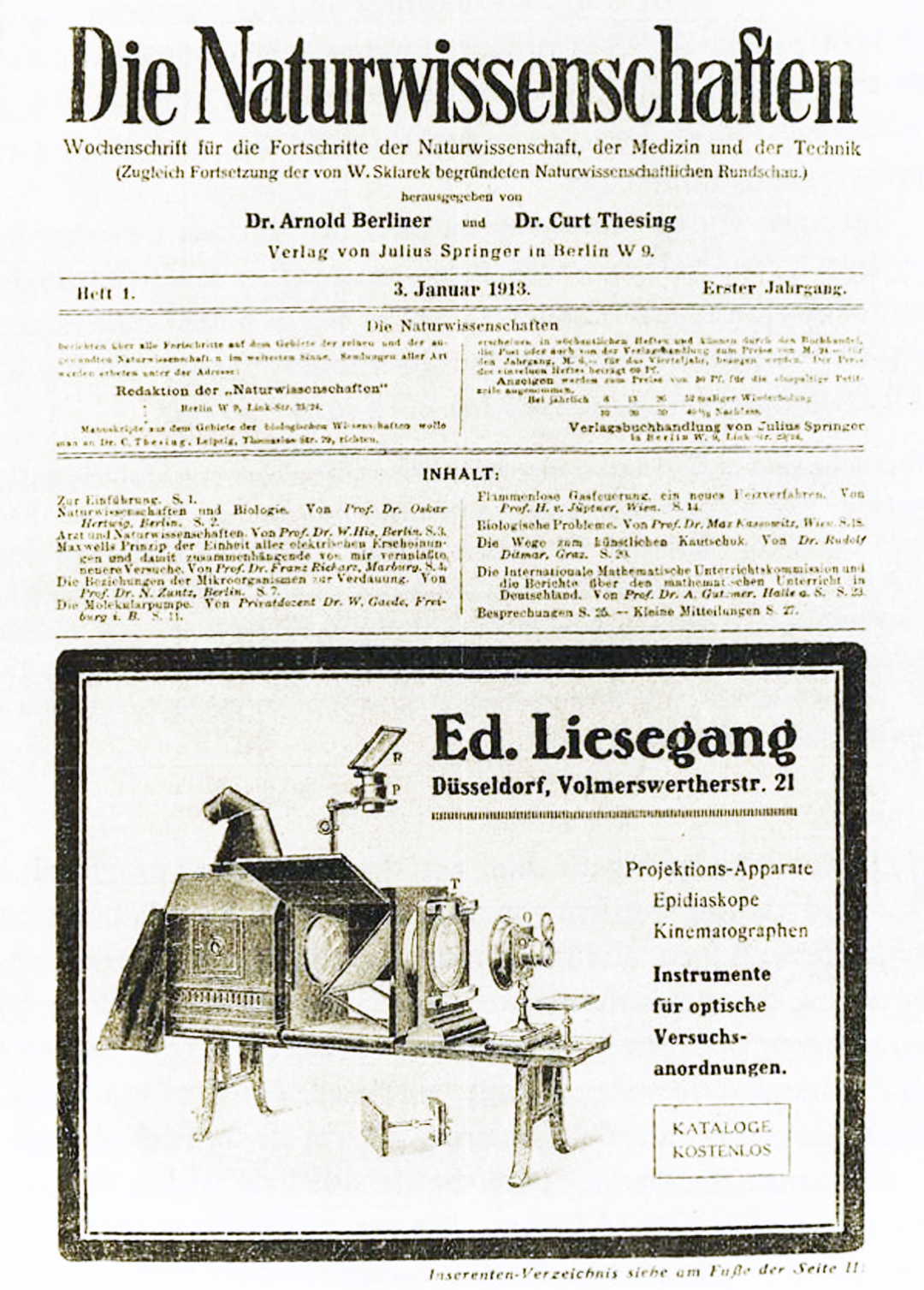 Titelseite der Zeitschrift Die Naturwissenschaften vom 3. Januar 1913; Heft 1; Erster Jahrgang